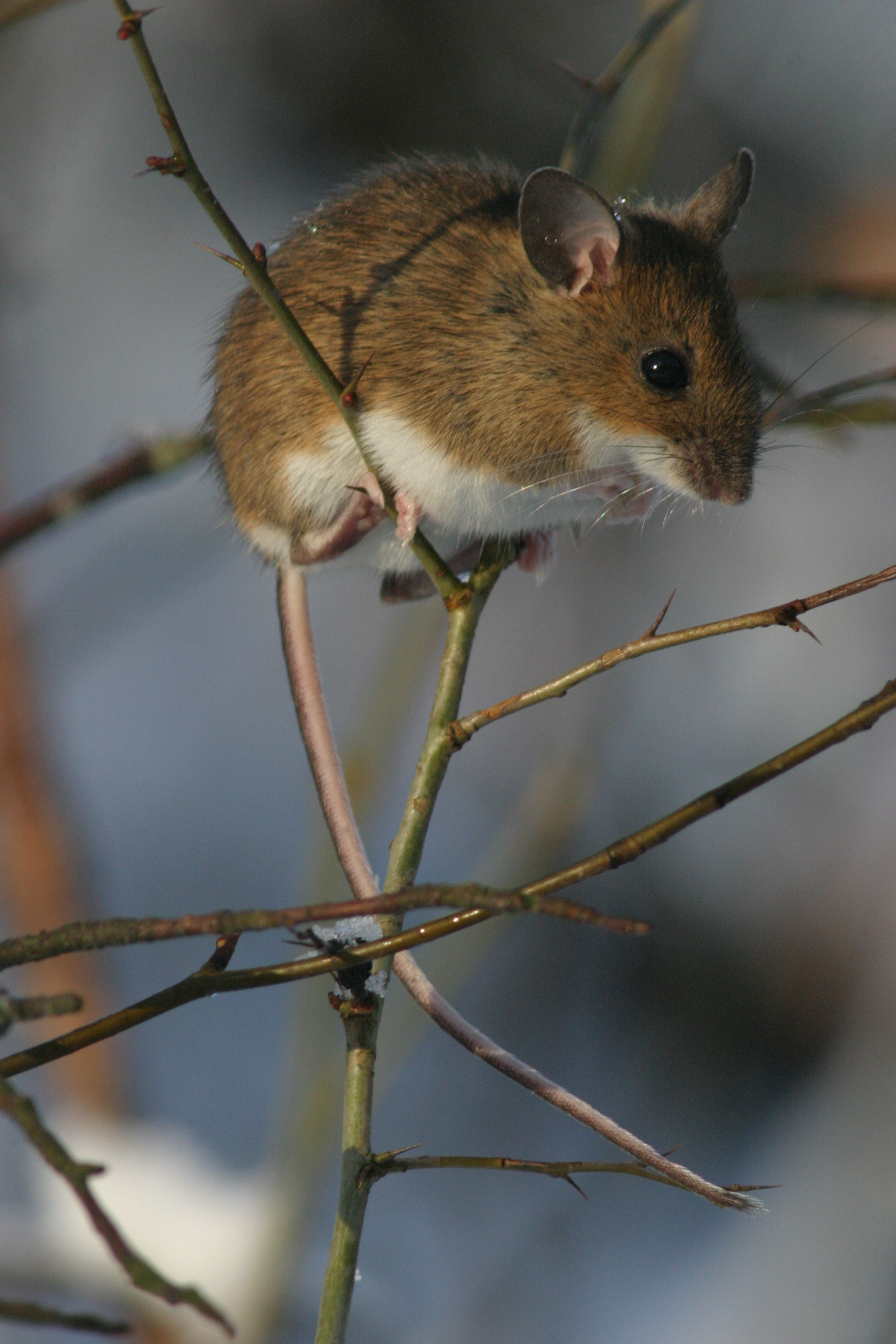 Halsbåndmus